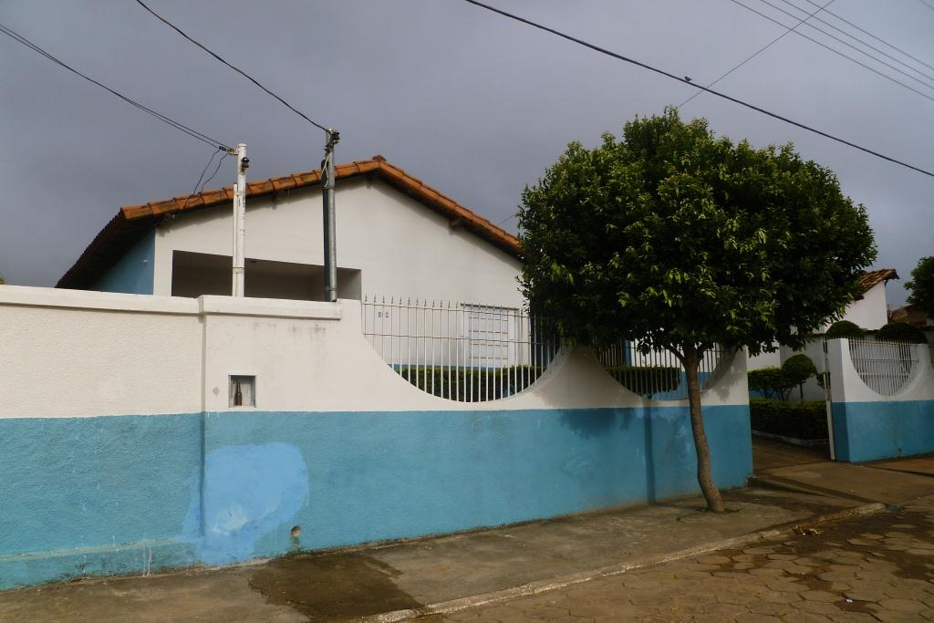 Sede da Prefeitura Municipal de Vargem Grande do Rio Pardo, Minas Gerais, Brasil.